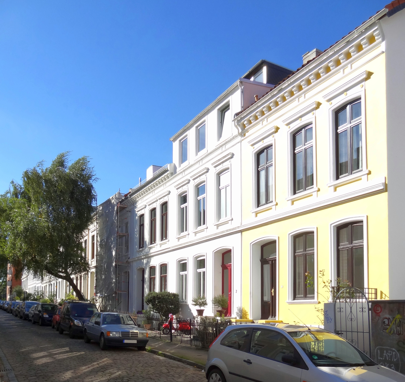 Ensemble Reederstraße in Bremen, Reederstraße 1Die Denkmalgruppe ist ein geschütztes Kulturdenkmal in der Freien Hansestadt Bremen, mit der Nr. 0979 beim Landesamt für Denkmalpflege registriert.